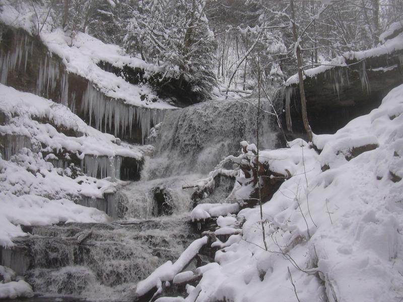 Hinterer Wasserfall des Hörschbachs im Winter; Bereich im NSG Hörschbachschlucht